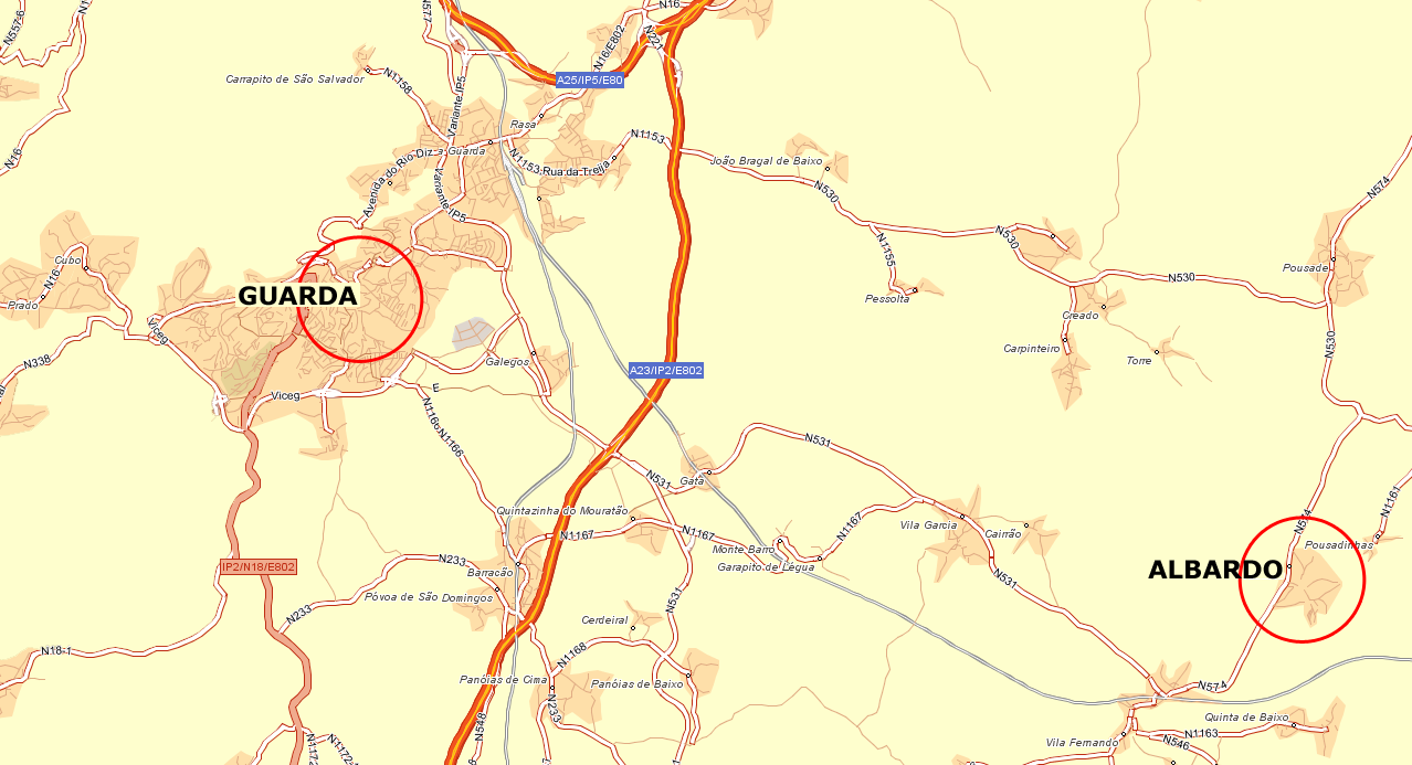 plan indiquant la position d'albardo